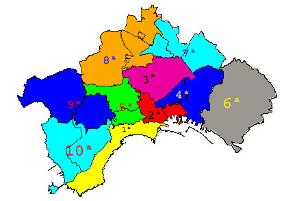 Mapa esquemático de las 10 muncicipalidades de Nápoles.